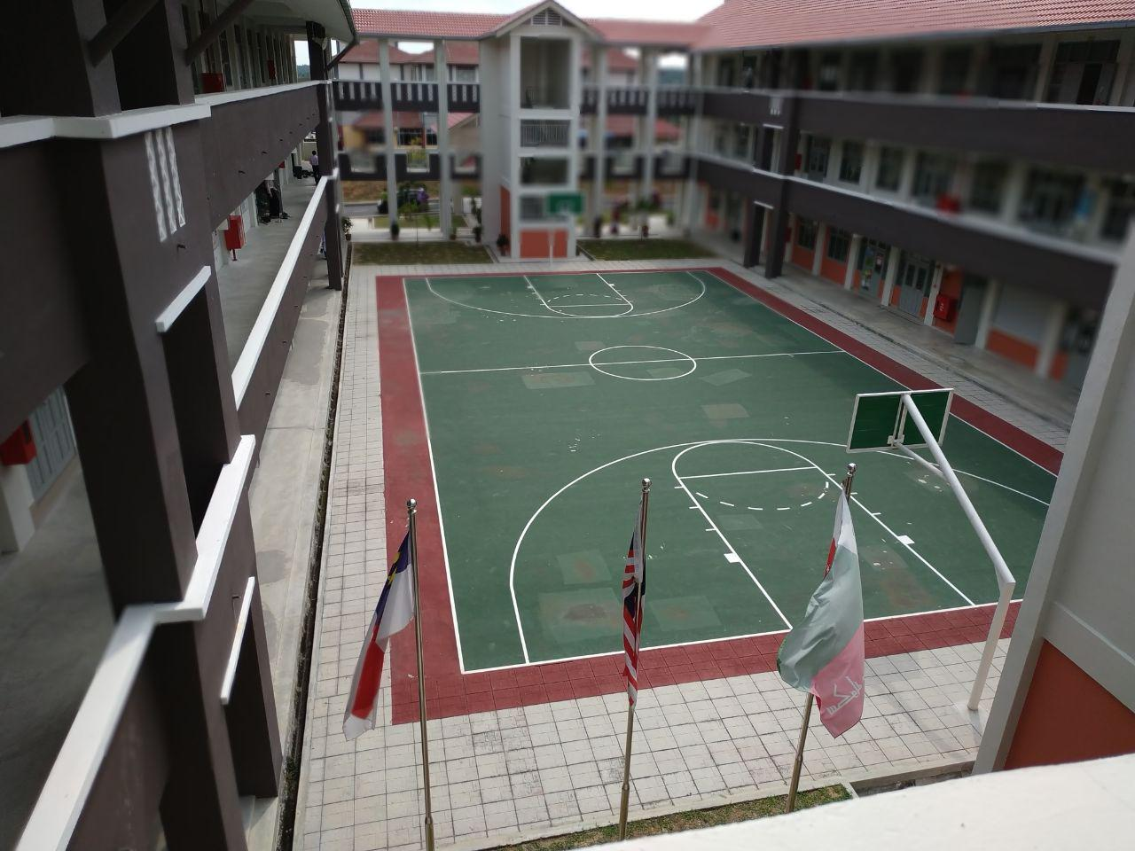 SMA JAIM ASSYAKIRIN